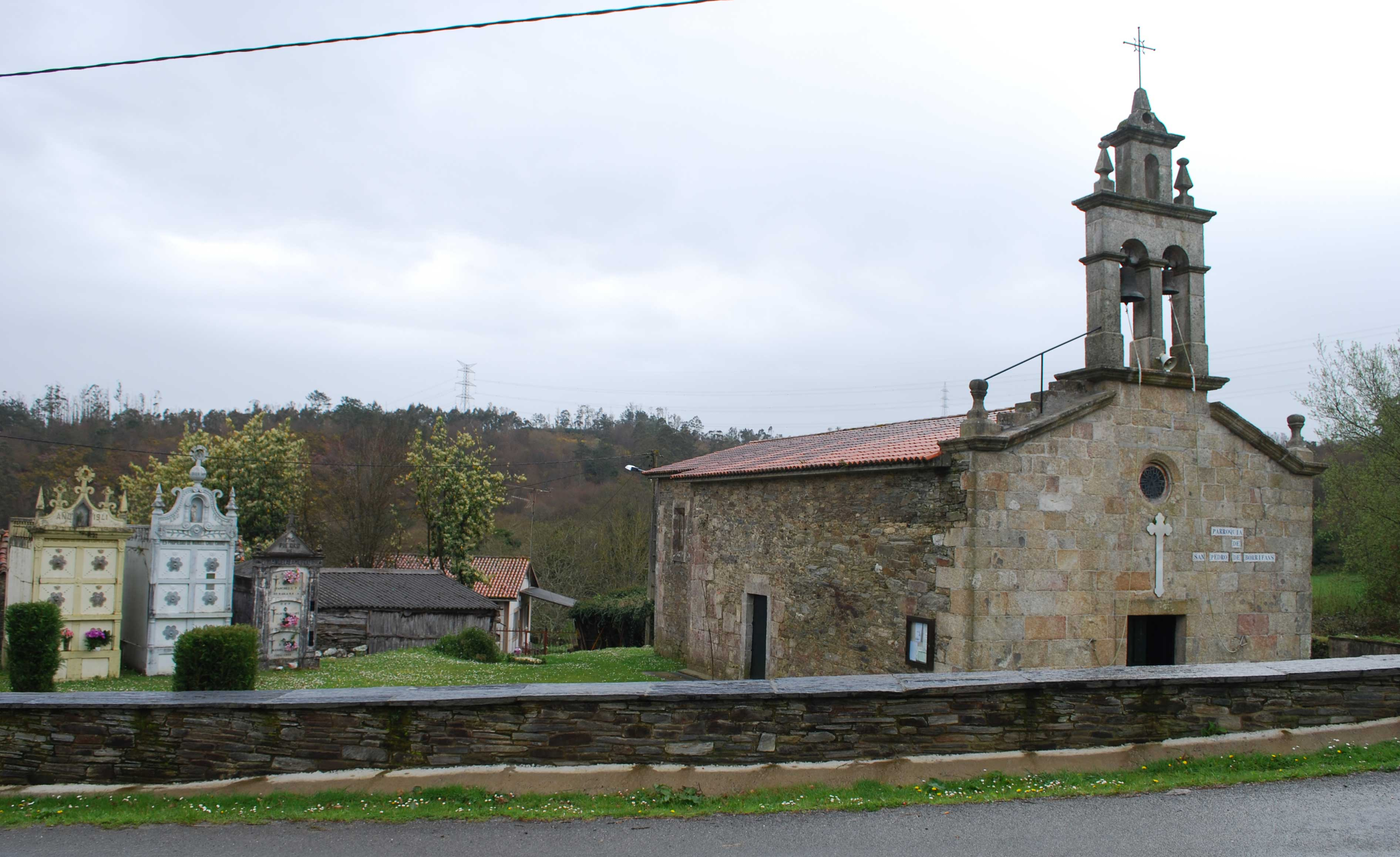 Vista da igrexa de Borrifáns en Cesuras A Coruña Galiza